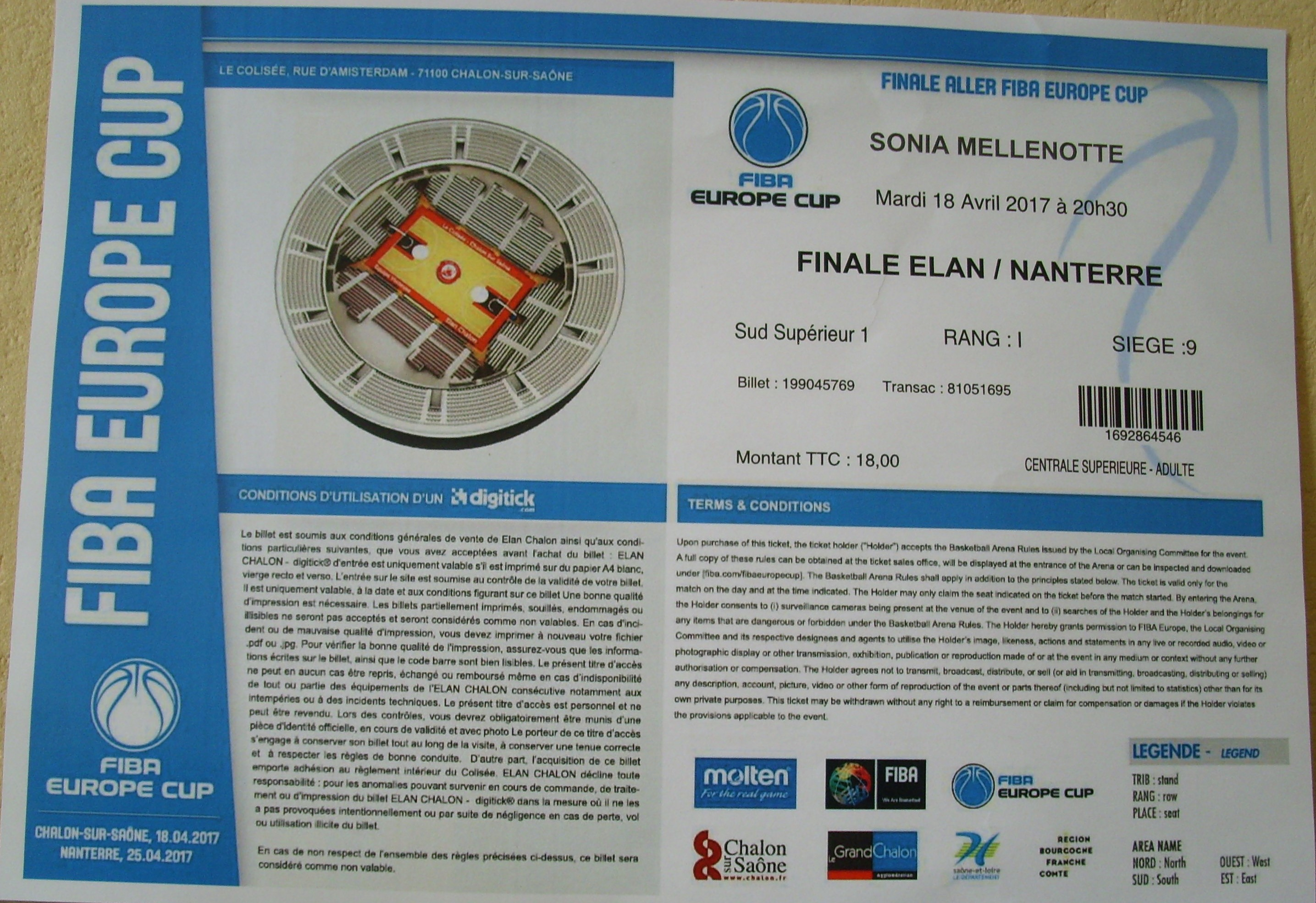 Feuille de billet de match de finale aller de Coupe d'Europe FIBA Chalon-sur-Saône - Nanterre (18 avril 2017)